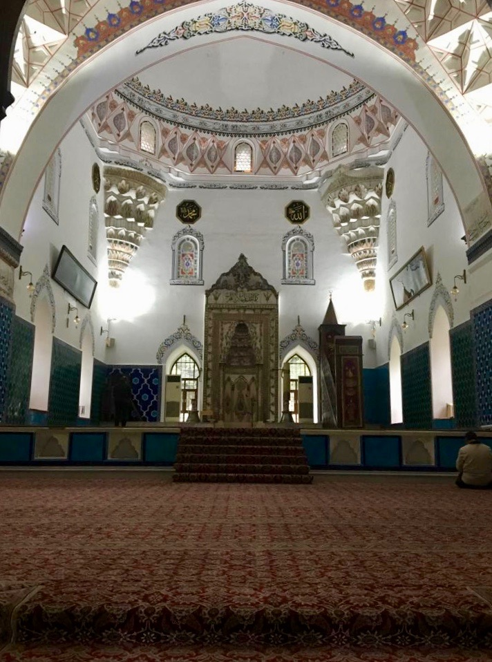 Bursa Muradiye Cami İç fotoğrafı